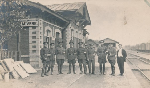 Auvere jaam 1930. aastatel This image on crowdsourcing geotagging platform Ajapaik